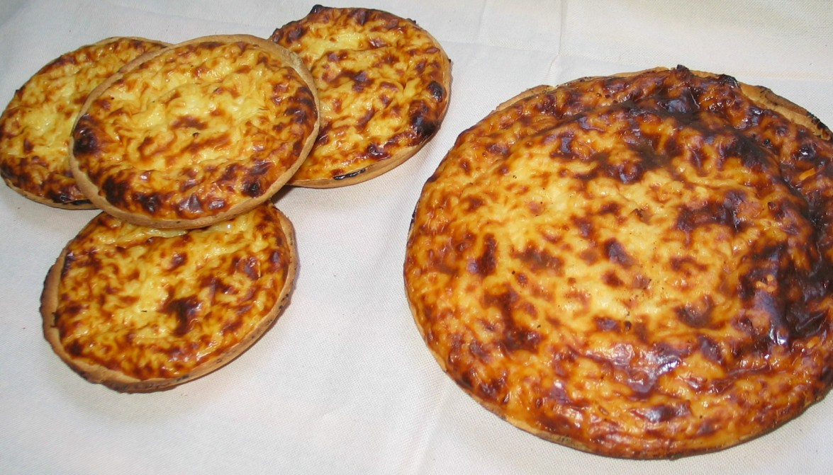 See: Belgian rice cake, Tarte au riz belge, Belgischer Reisfladen, Rijstevlaai Capture date: 2005-09-08 Photographer: Frinck51 = new global account Frinck (talk) Private collection